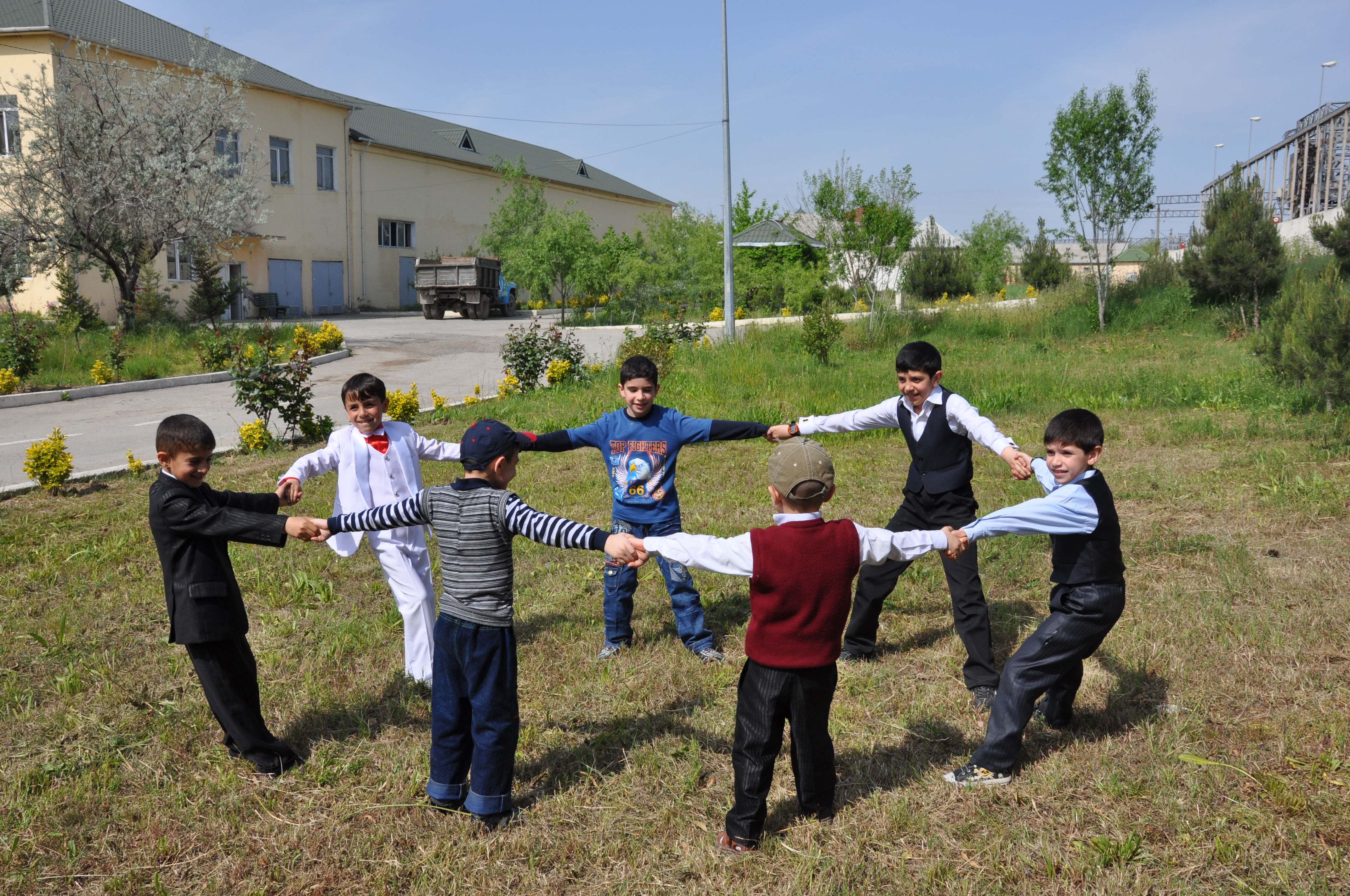 Azərbaycanın bir çox xalq oyunları oynalınan zaman başlanğıc formada dəstələrə bölünmədən canlı halqa yaratma anı